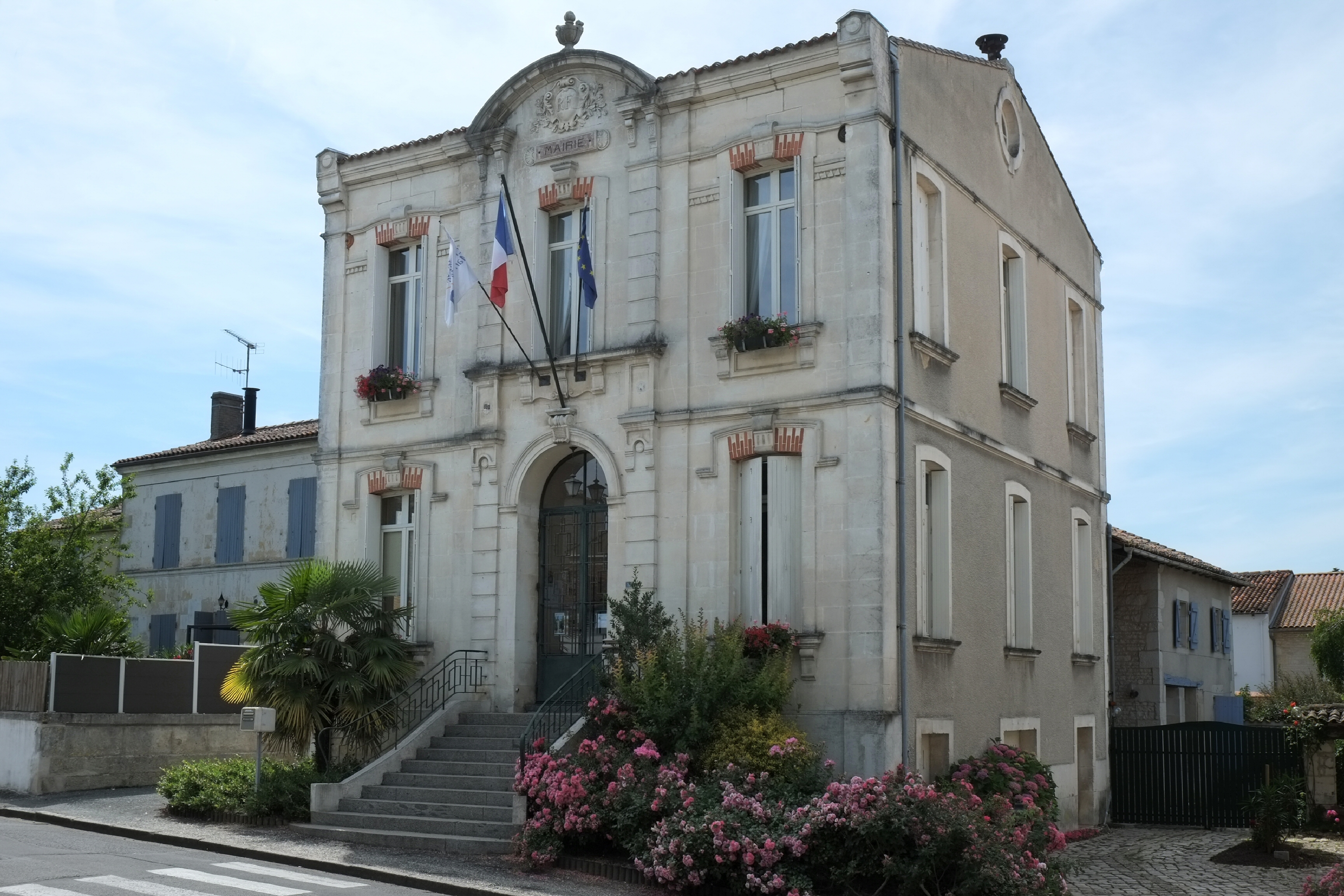 Mairie Saint-Georges-du-Bois Charente-Maritime France